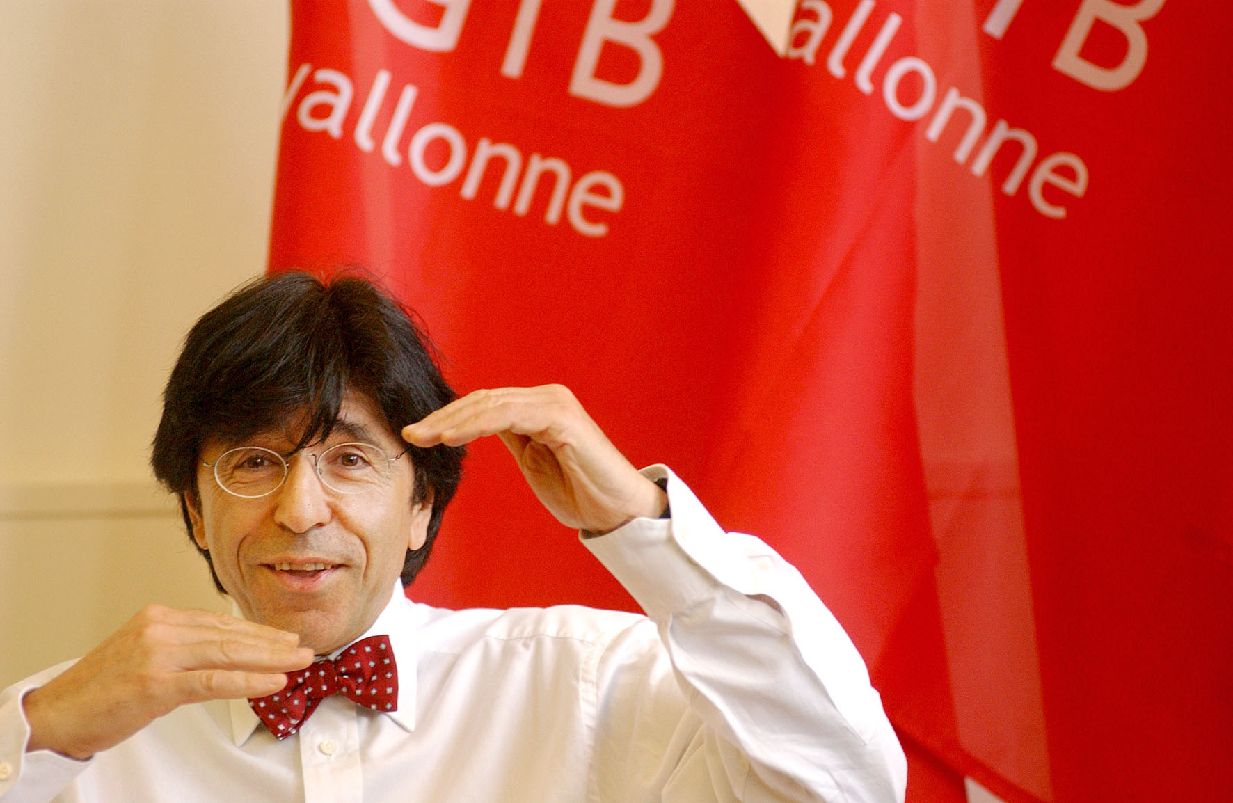 Elio Di Rupo, Waals-Belgische scheikundige en politicus, Parti Socialiste (PS)